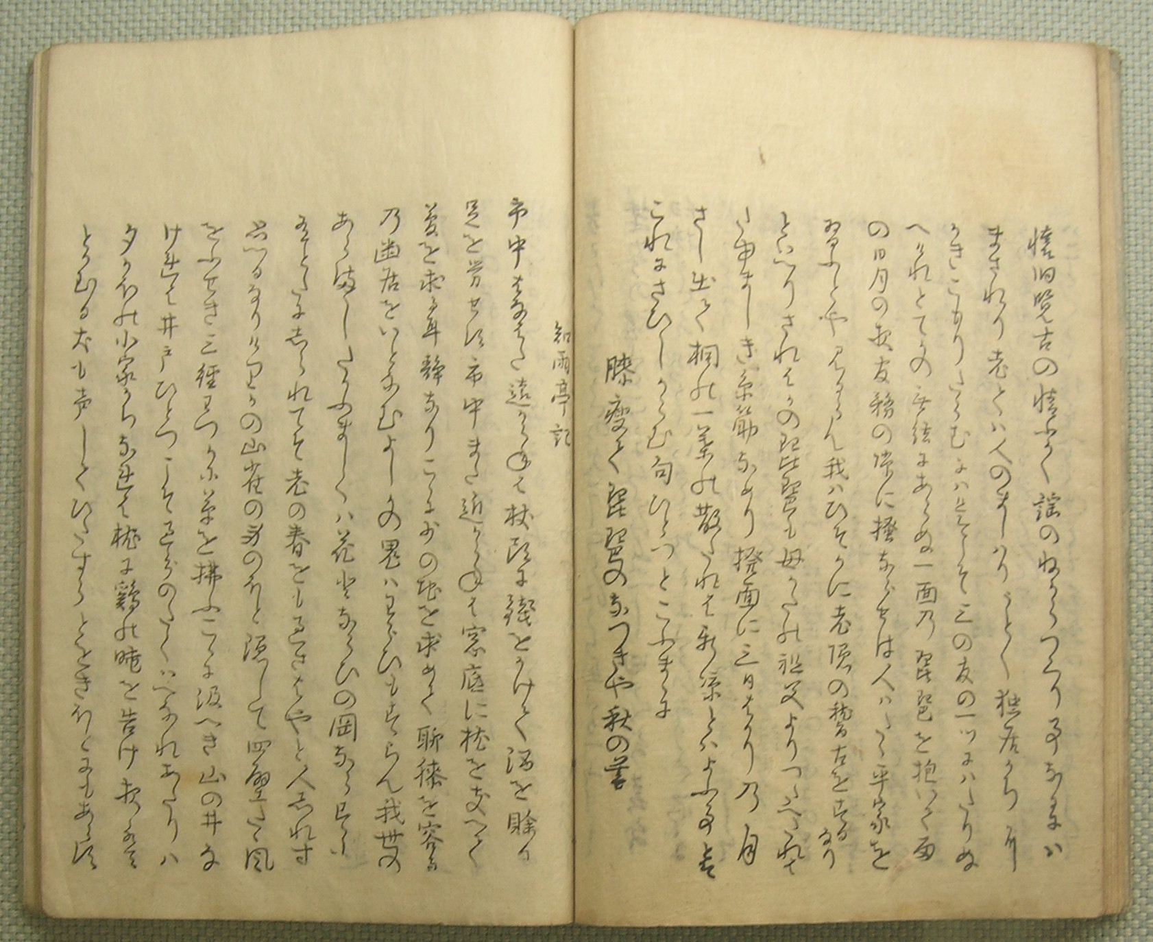 Uzuragoromo. Loc: Aichi Prefectural Library. 愛知県図書館が保有する『鶉衣』前編 下巻（天明7年）。 撮影場所 愛知県図書館